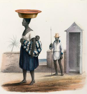 San Iago. (Iles du Cap vert.). Soldat noir et négresse